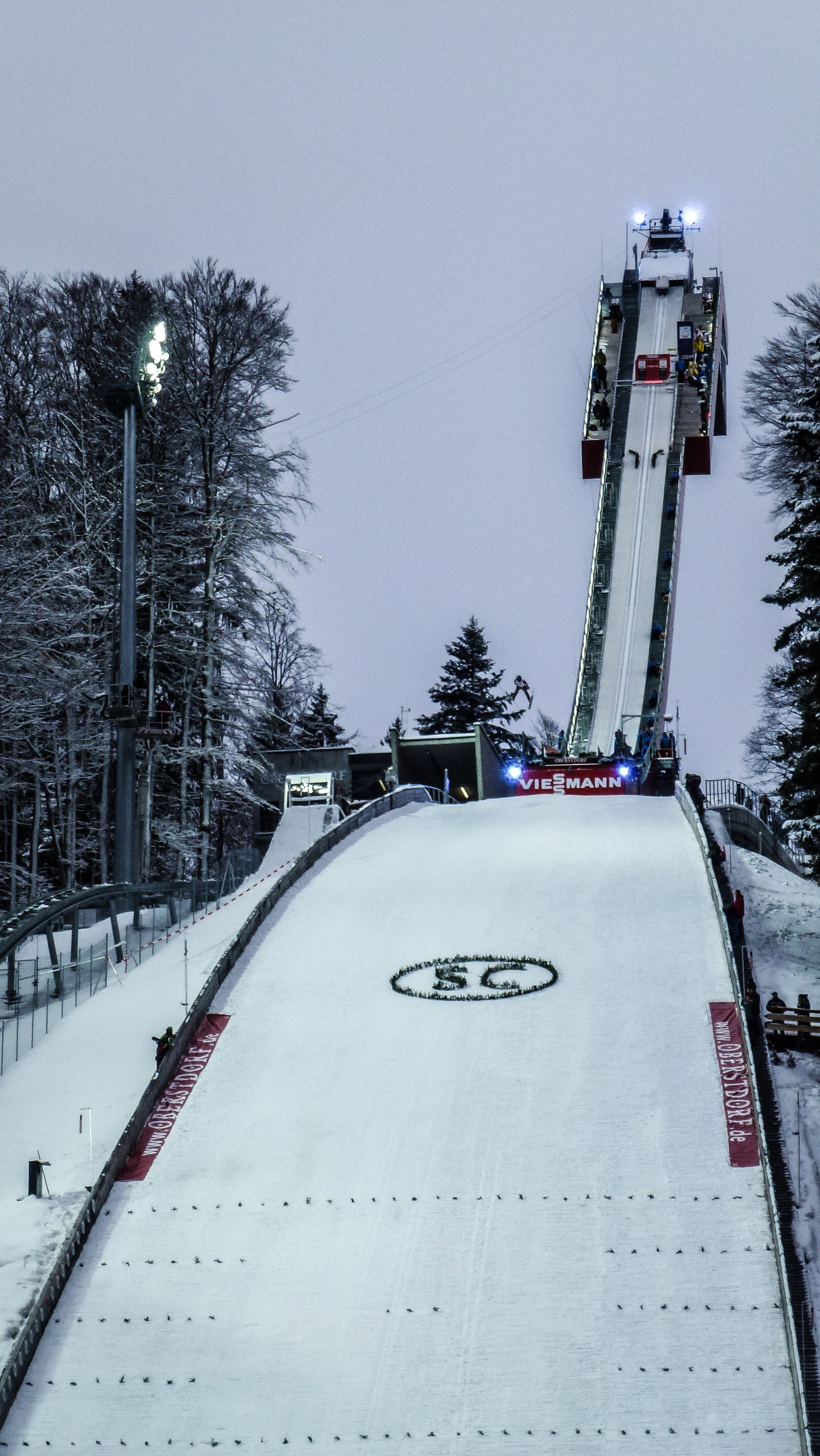 Die Heini-Klopfer-Skiflugschanze während der Skiflug-Weltmeisterschaften 2018.